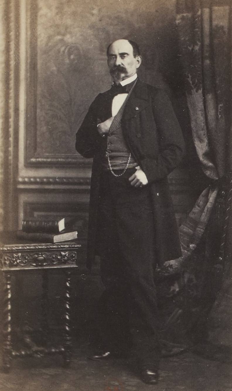 Album des députés au Corps législatif entre 1852-1857.